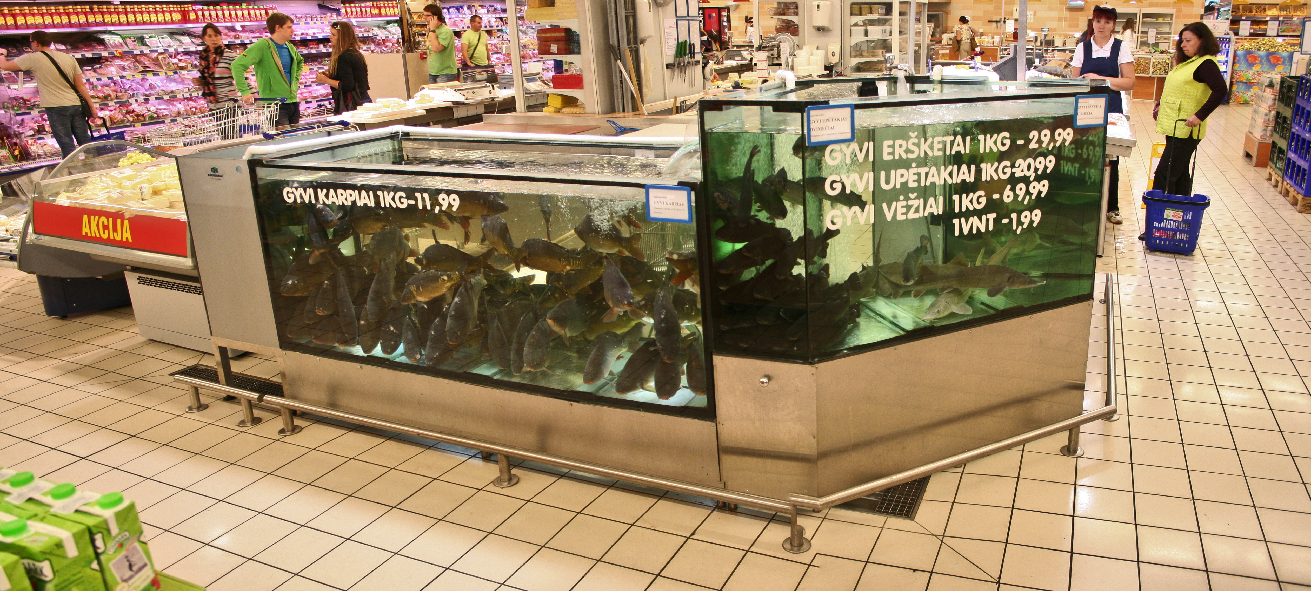 Tavaratalon kalatiski, jossa kalat säilytetään akvariossa, Kaunas, Liettua